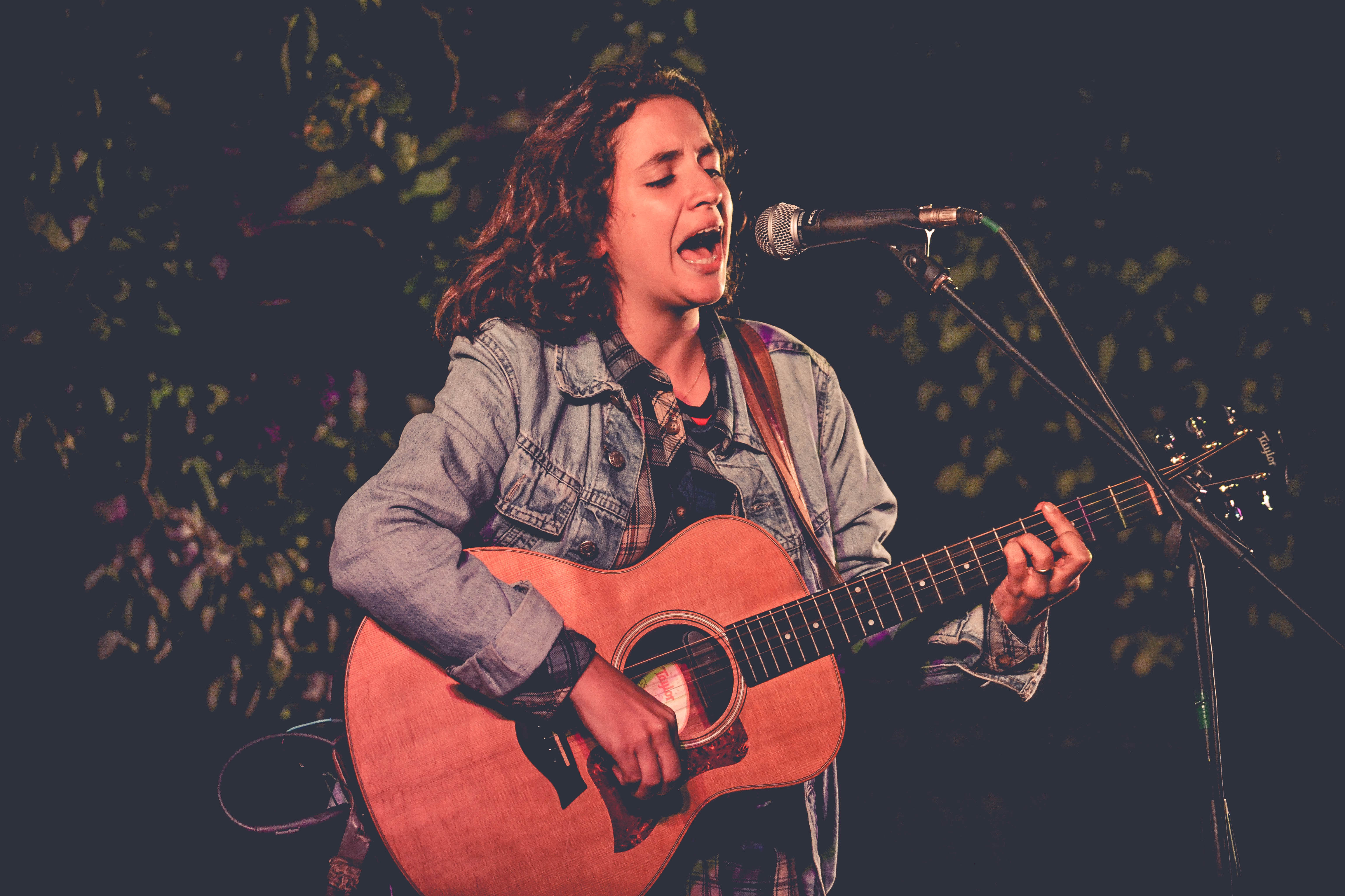 Bárbara "Barbi" Recanati (n. Buenos Aires, Argentina, 28 de noviembre de 1986) es una cantante, compositora y guitarrista de rock de Argentina. Fue la vocalista y guitarrista rítmica de la agrupación de rock alternativo, garage y punk Utopians desde el año 2005 hasta su disolución 2017. En 2018 presentó su nuevo proyecto musical como solista.